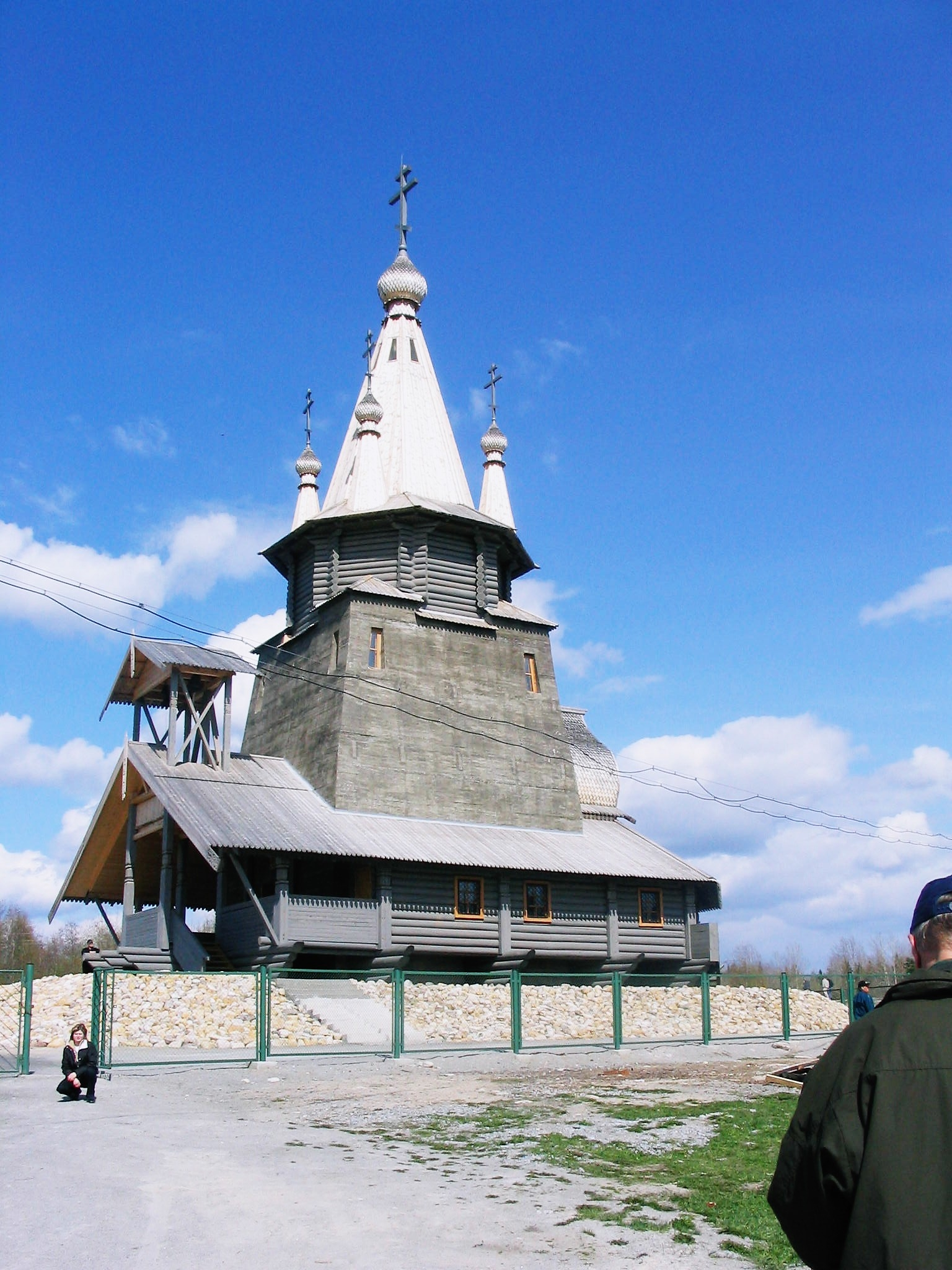 Poventsan uusi kirkko toukokuussa 2004. Itse otettu.